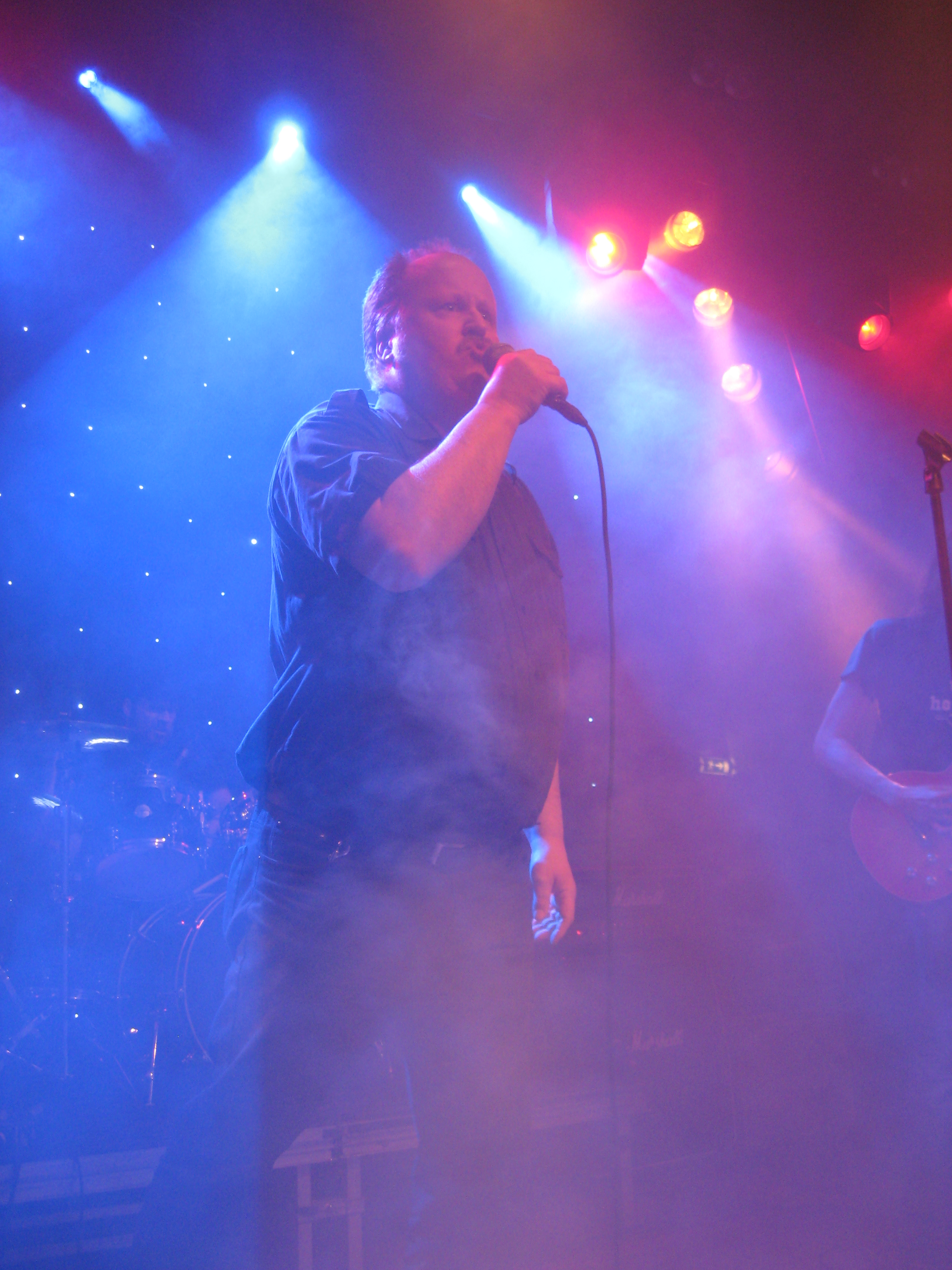 Bizex-B at Punkgala at Göta Källare April 2010.